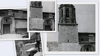 Collage de imágenes de la Iglesia de Castelnou